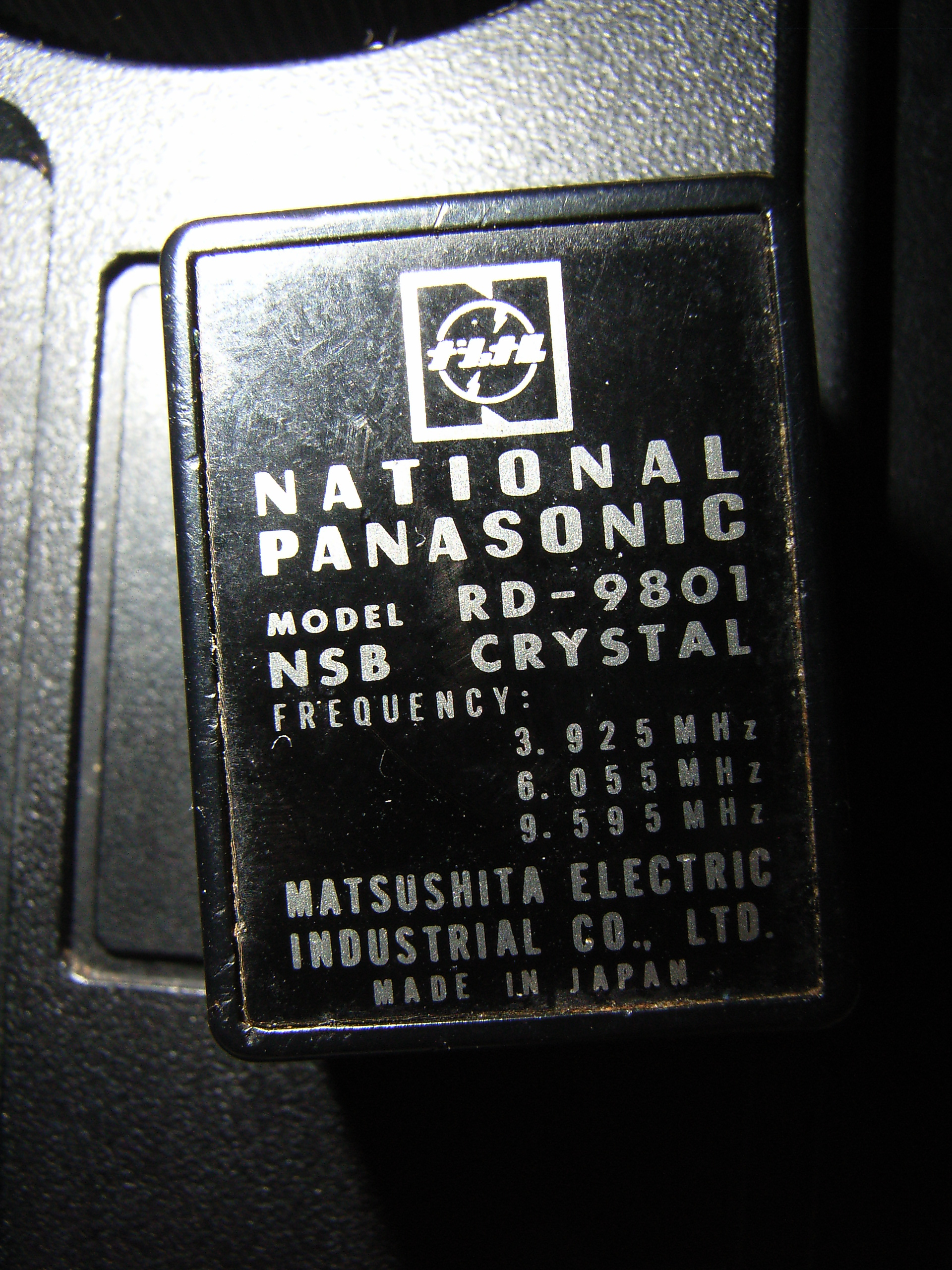 RF-877 NSBクリスタル端子にNSBクリスタルを装着した状態